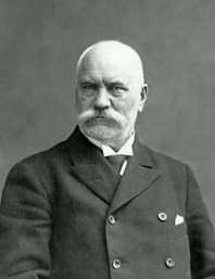 Иван Корнильевич Покровский (в Думе Покровский 1-й[1]; 1845 — после 1912) — подпоручик, губернский секретарь, предприниматель, меценат, депутат III Государственной Думы Российской империи от Оренбургской губернии (1907—1912).